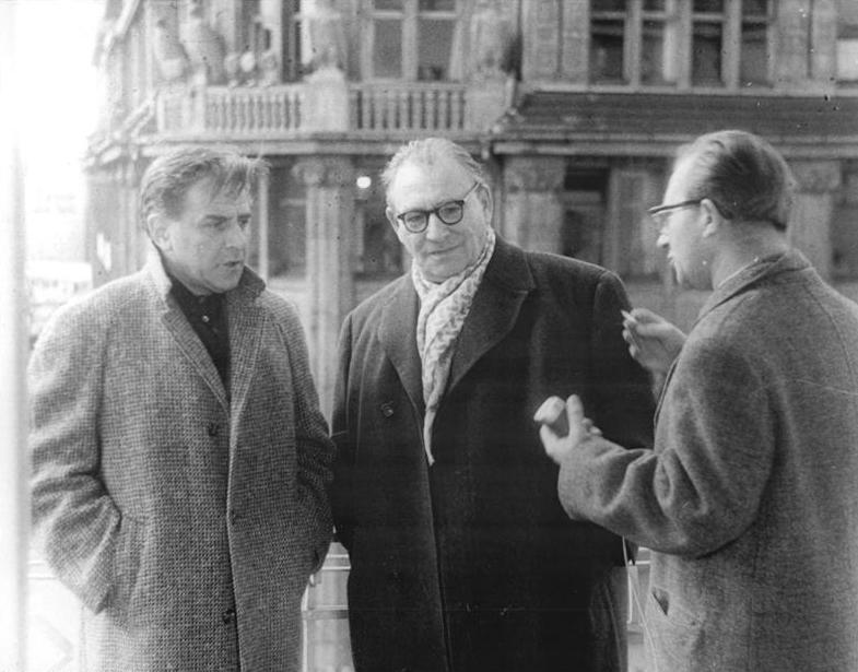 Zentralbild Petersen Som-Qu 3.11.1959 Gastspiel des Deutschen Theaters in Hamburg. Großen Erfolg hatten die Mitglieder des Deutschen Theaters in Hamburg. Sie gastierten vom 27.10.1959 bis zum 1.11.1959 mit Maxim Gorkis "Die Kleinbürger" im Theater am Besenbinderhof. UBz. Die beiden Regisseure Wolfgang Heinz (Mitte) und Karl Paryla (links) geben dem Fernsehfunk ein Interview."